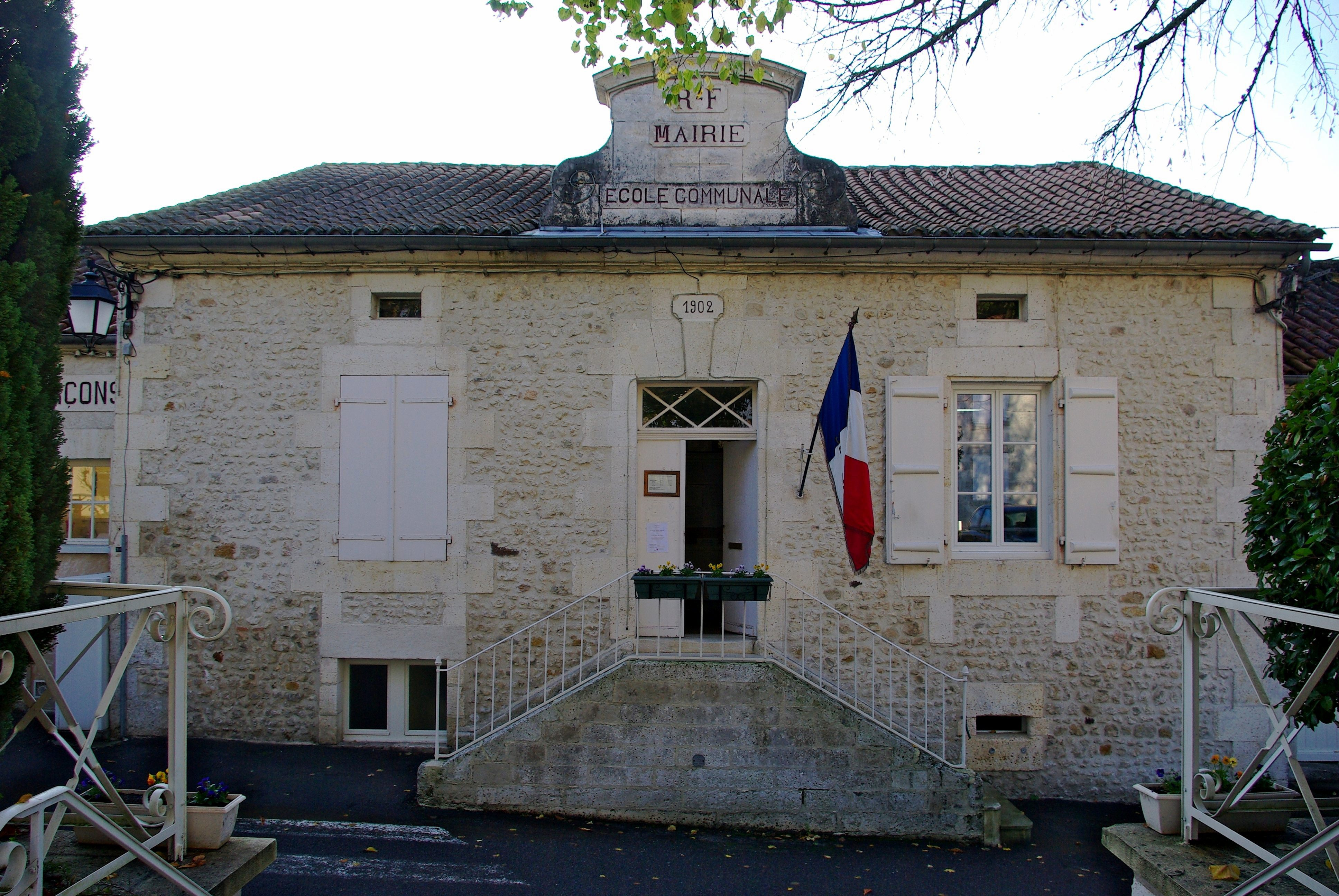 Mairie de Juignac, Charente, France.